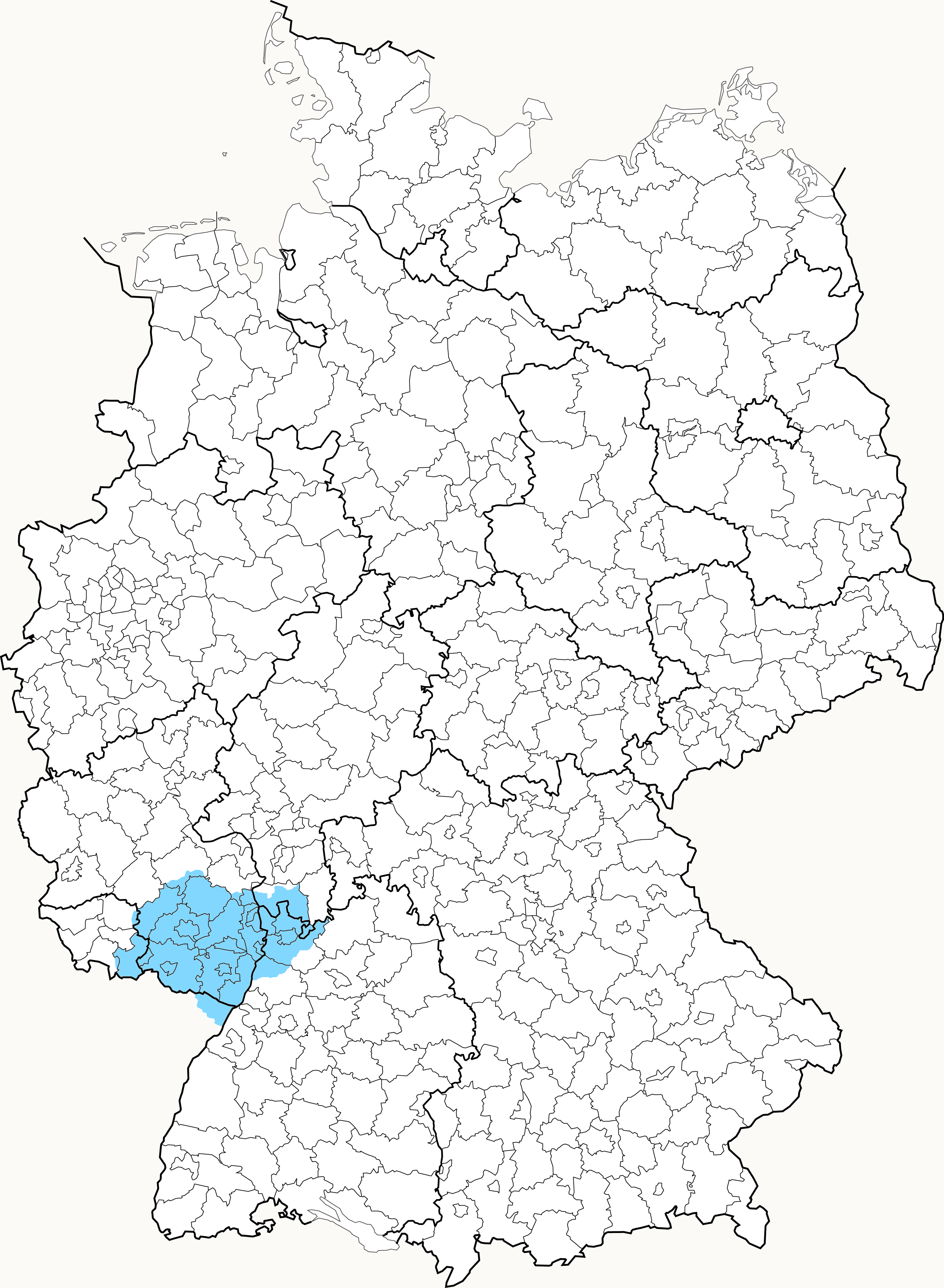 Pfälzisches Dialektgebiet